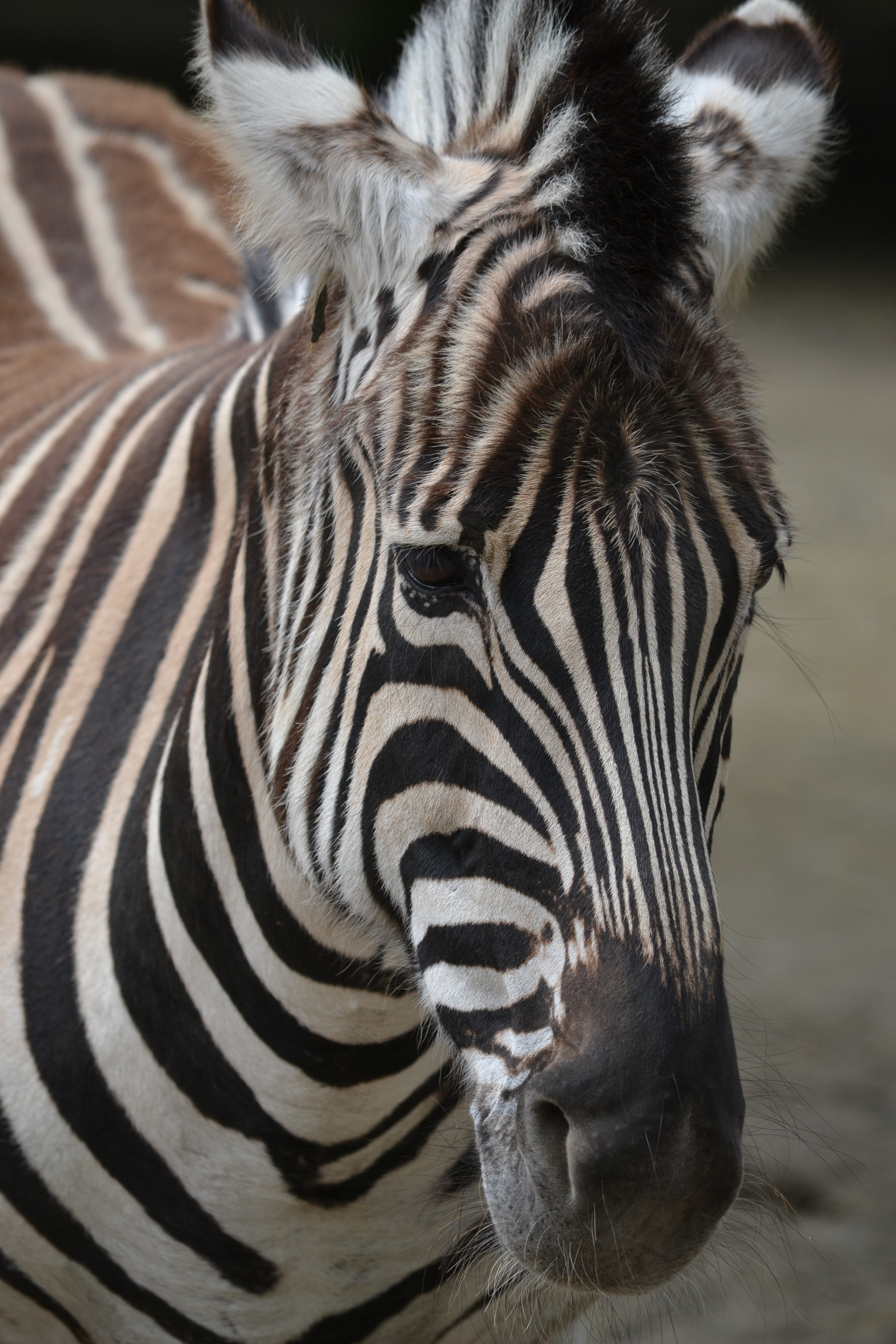 Deze foto is gemaakt in Diergaarde Blijdorp. This picture was taken at Rotterdam Zoo.